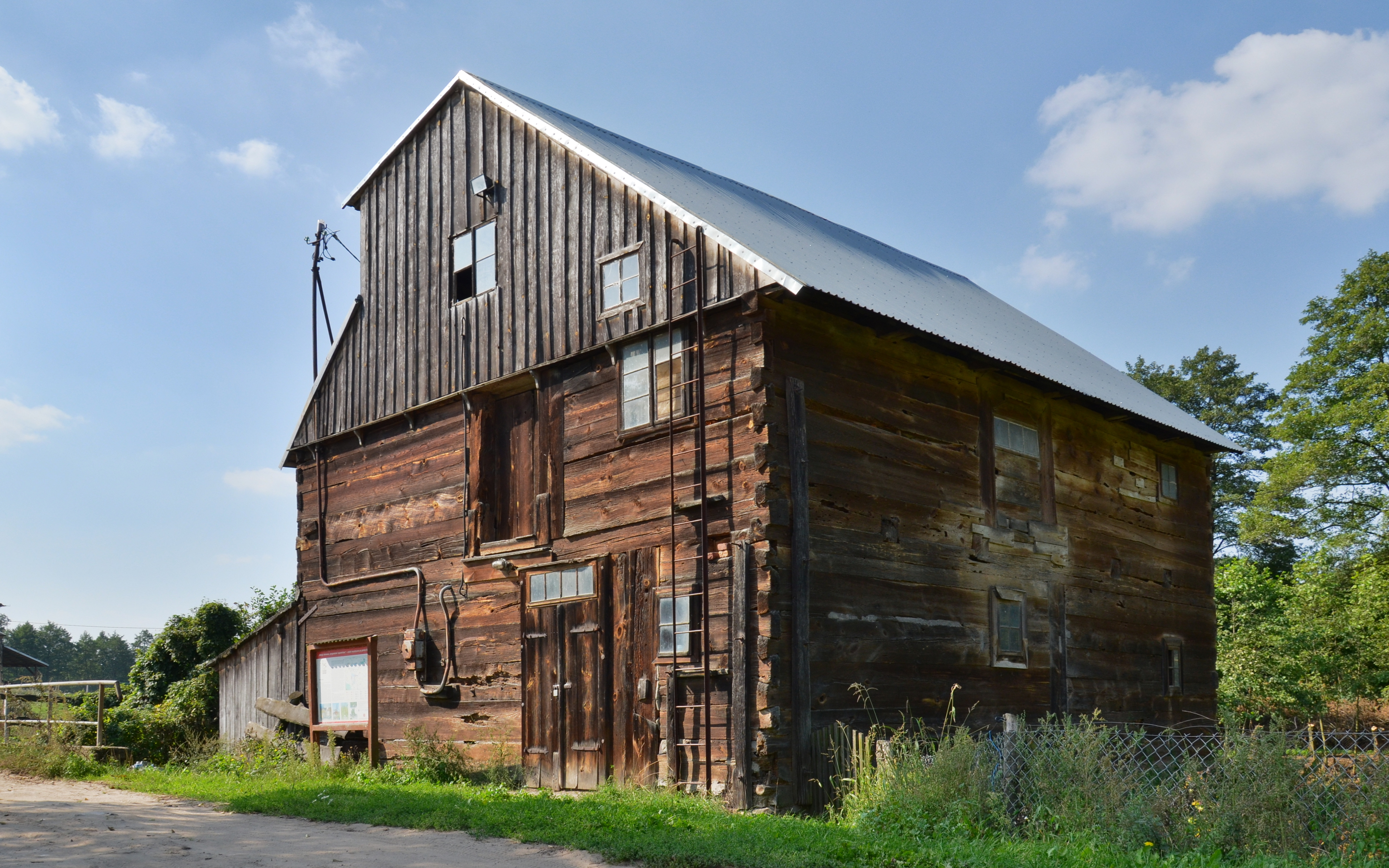 Nietrzeba, część wsi Lubianki, młyn wodny, ob. elektryczny, ok. 1850